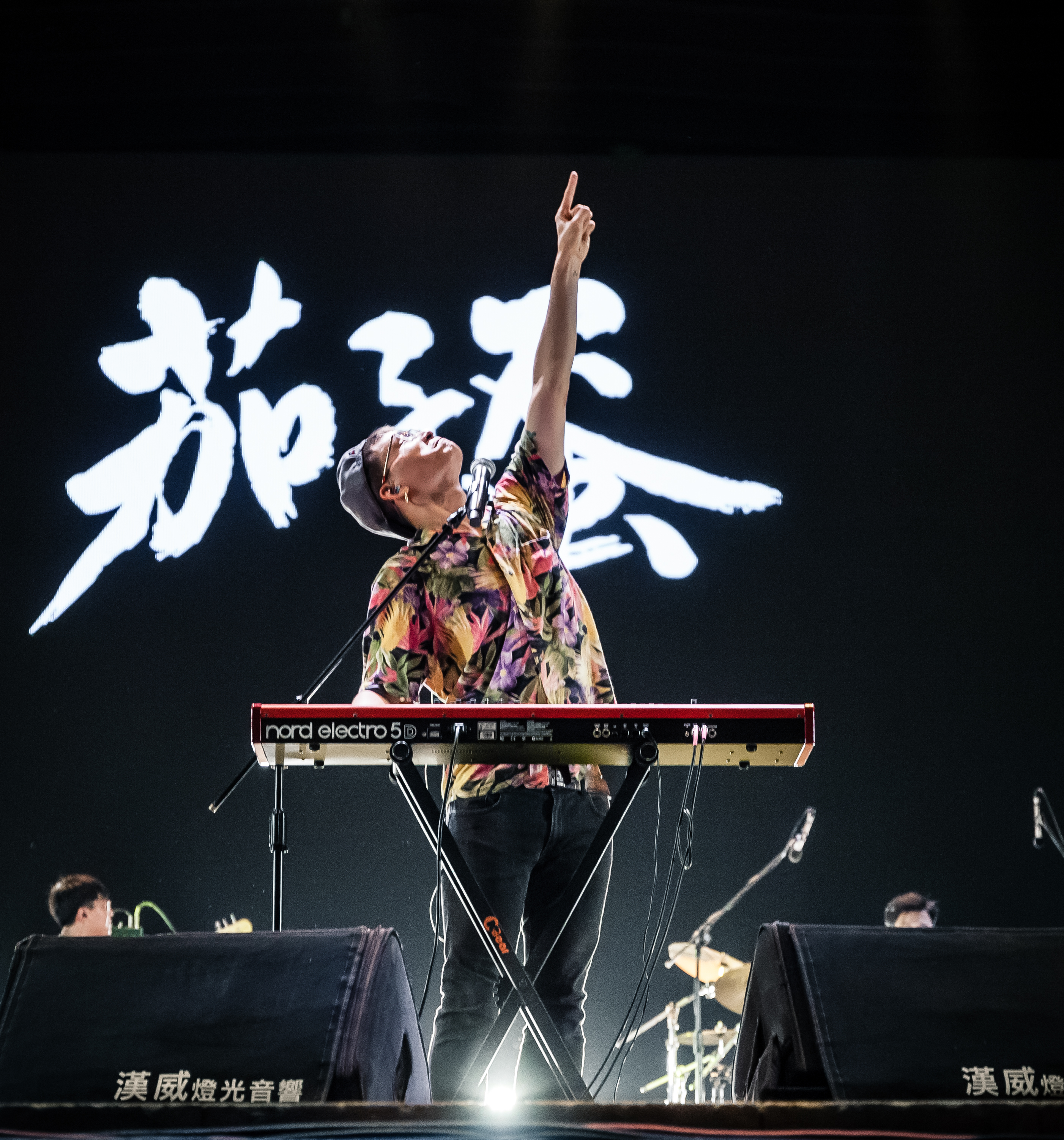 中文（台灣）: 茄子蛋主唱暨鍵盤手黃奇斌，於台中市文心森林公園「2019搖滾台中」演出